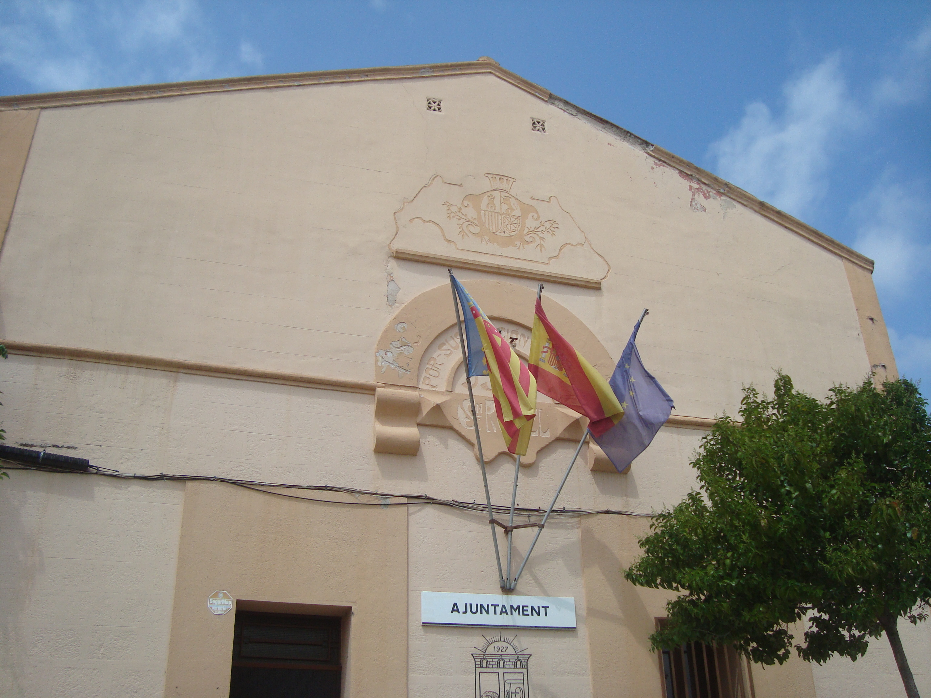 Ajuntament de Sant Rafel del Riu (Castelló)